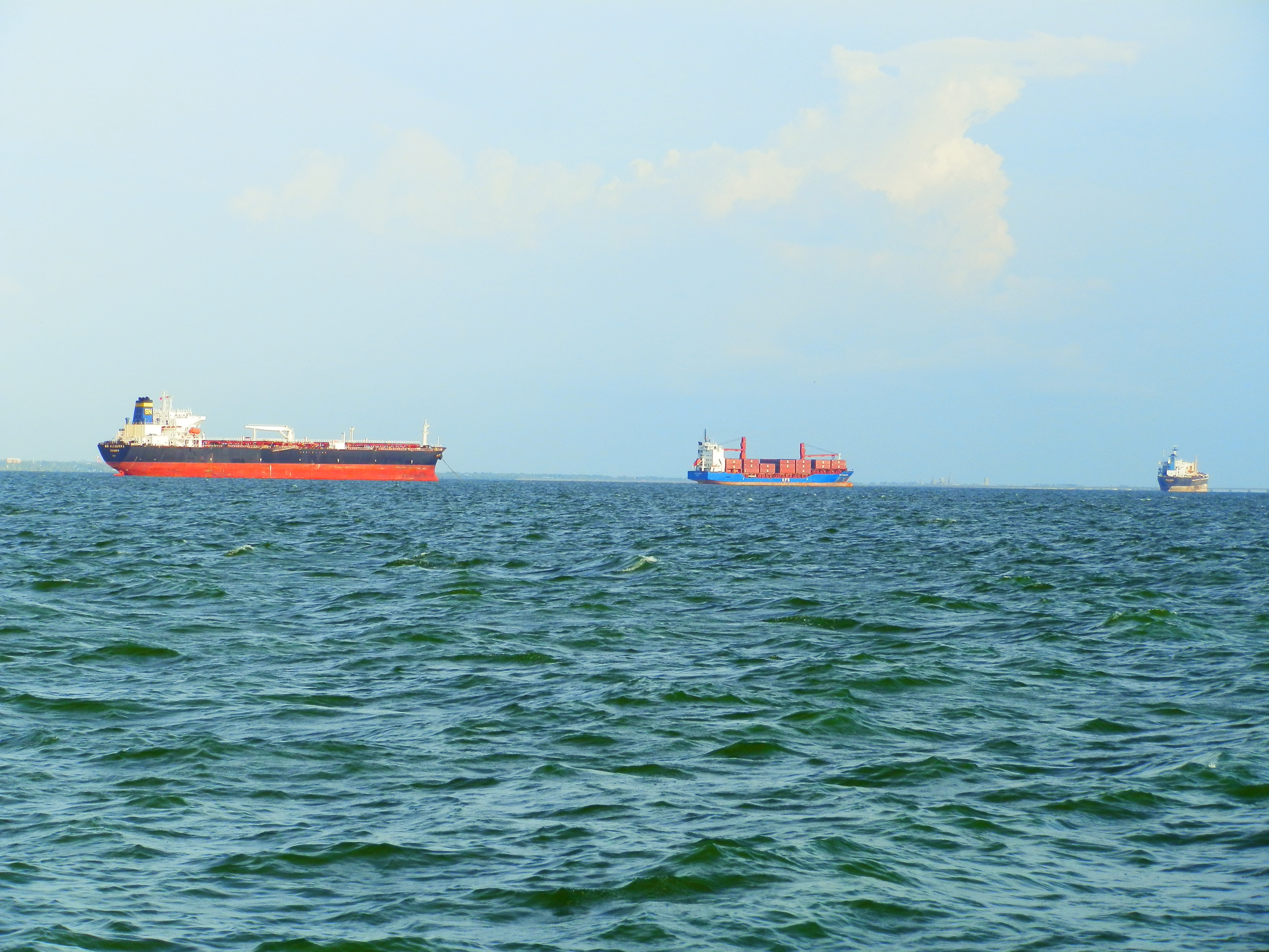 Barcos de carga en el Lago de Maracaibo